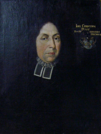 Prof. Johann Christoph Pfaff Bezeichnung: „IOH. CHRISTOPH / PFAFF / D. & PP. ECCLESSIAE / DECANVS“ (o.r.) Material: Öl auf Leinwand, Bild: 66 cm x 50,5 cm, Rahmen: 77,8 cm x 62,8 cm (Tübinger Professorengalerie)